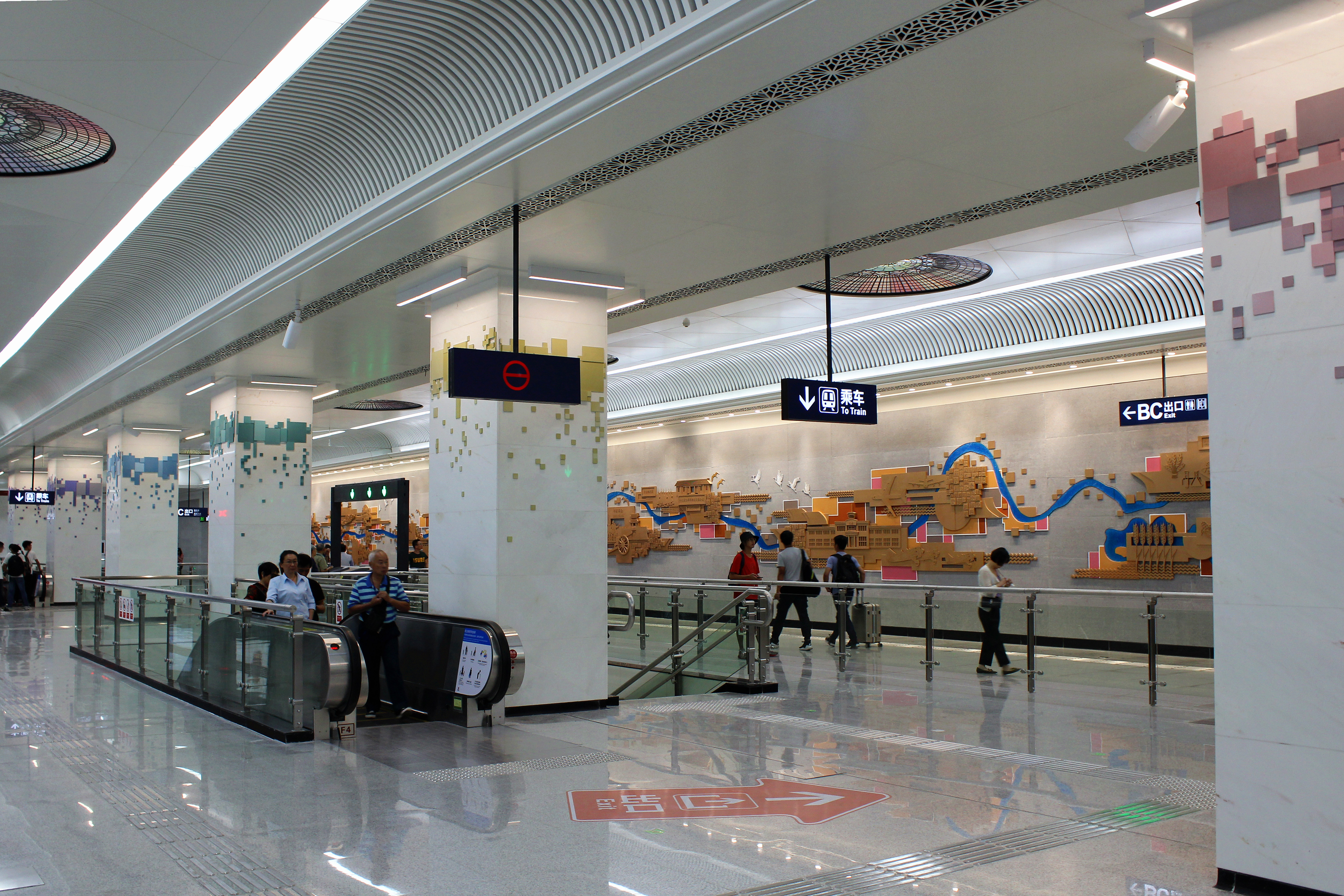 武汉地铁7号线湖工大站站厅